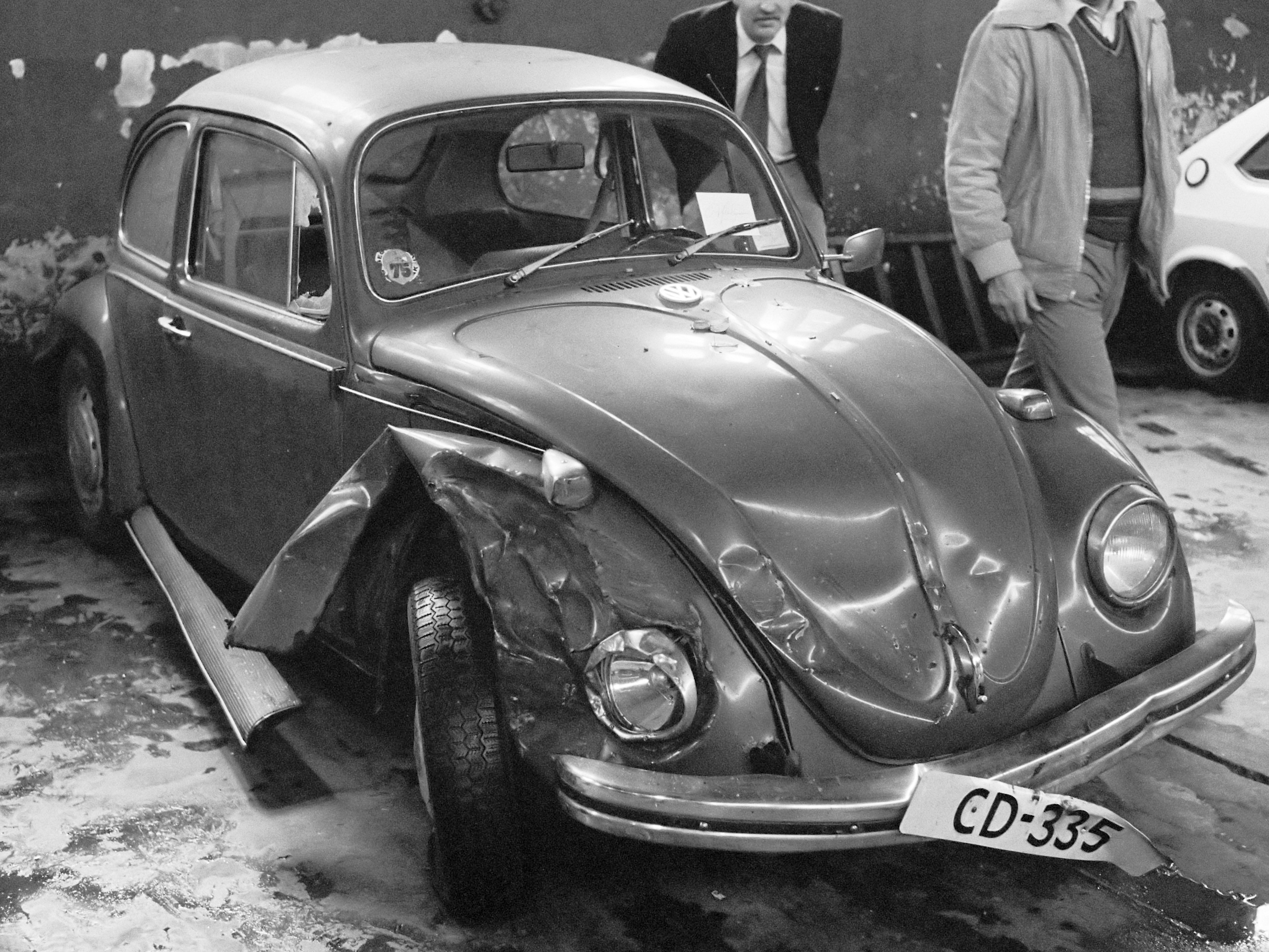 Auto (een VW kever) van de in Den Haag doodgeschoten Ahmet Benler, zoon van de Turkse ambassadeur Özdemir Benler. De aanslag is opgeëist door de Armeense terreur-organisatie Asala 12 oktober 1979